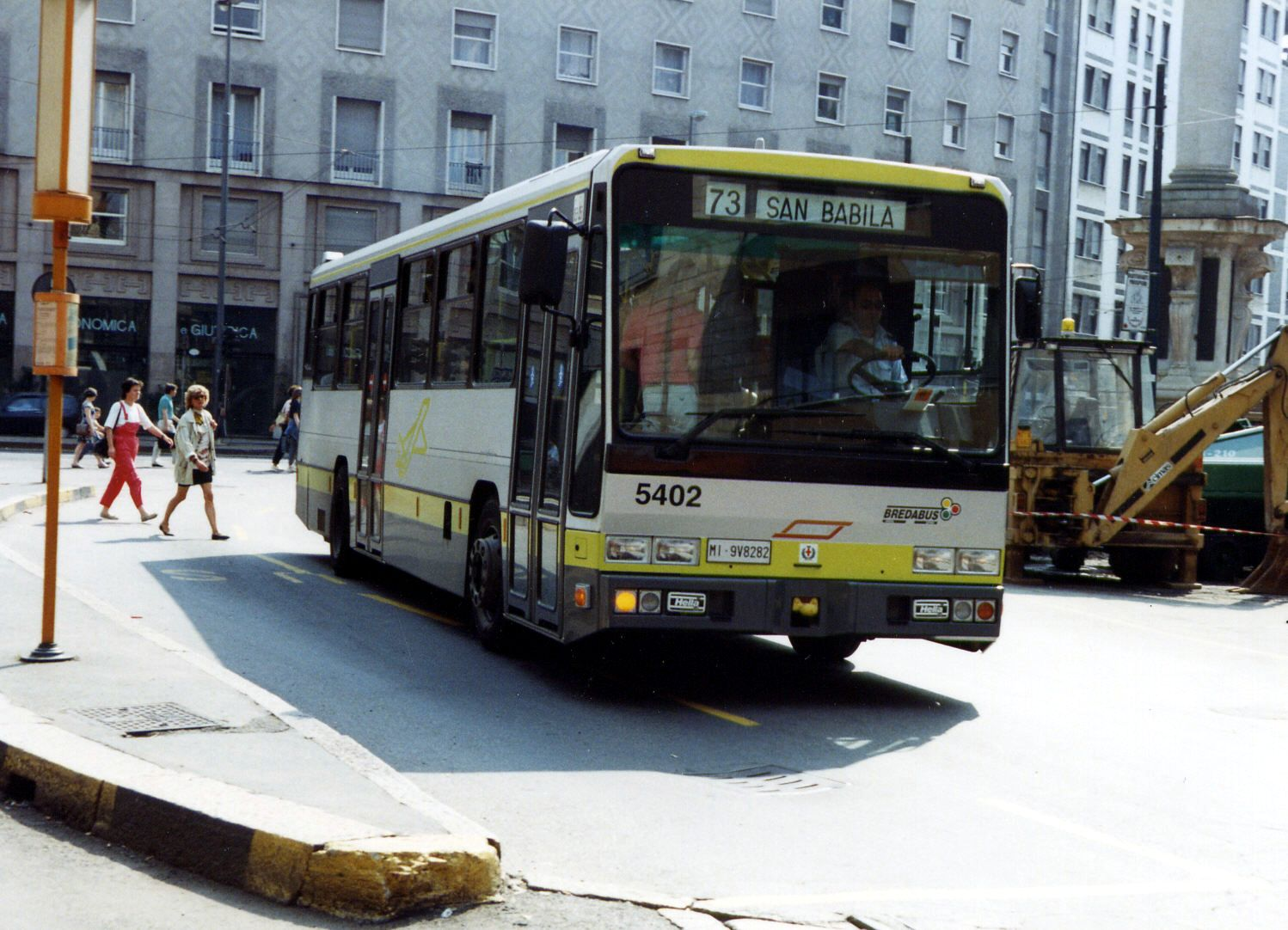 Autobus 5402 dell'ATM di Milano in largo Augusto. Modello BredaBus BB 3001, numeri 5400-5415